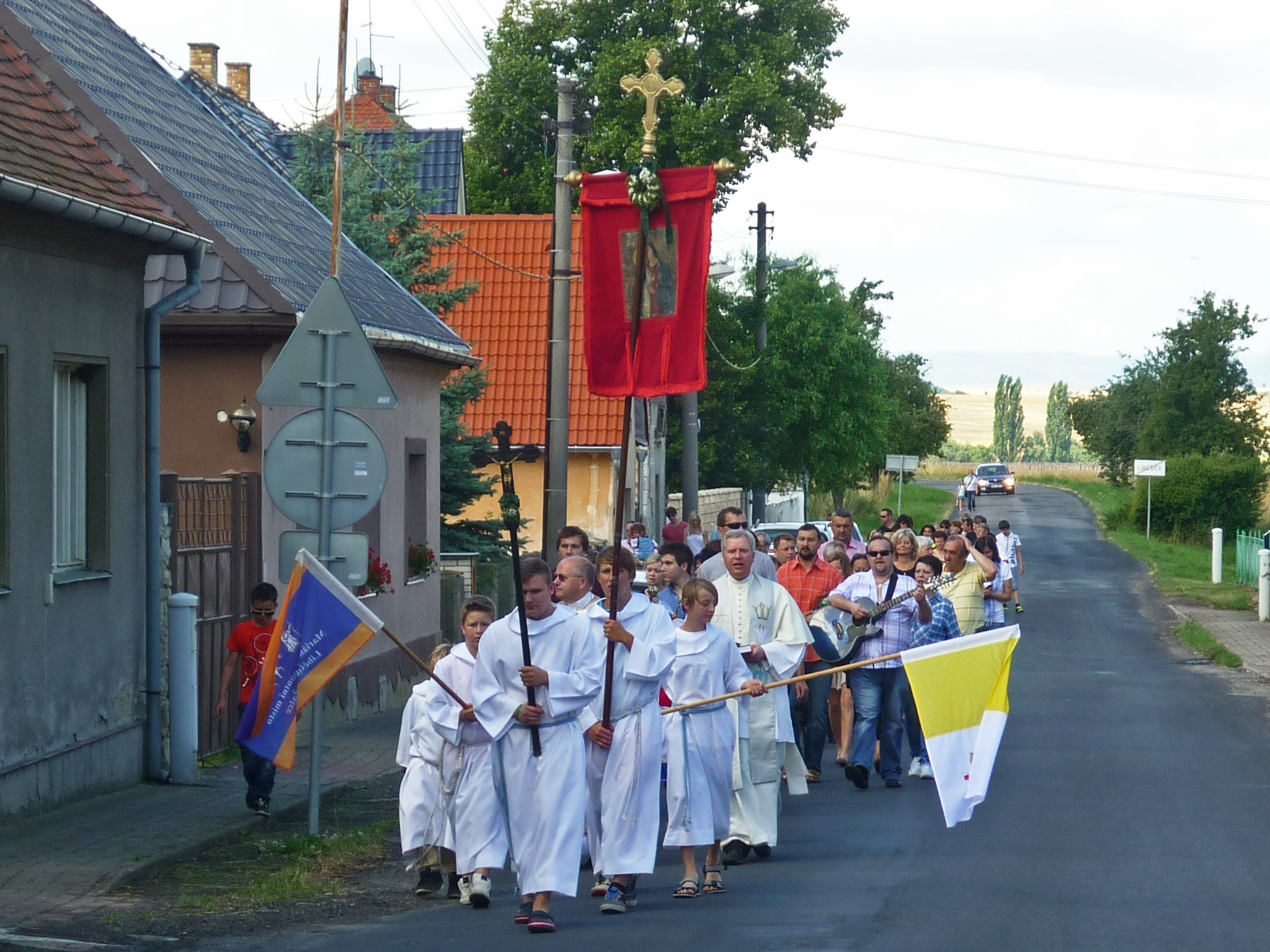 Liebeschitzer Wallfahrt 2014, Prozession zur Kirche in Liebeschitz / Liběšice